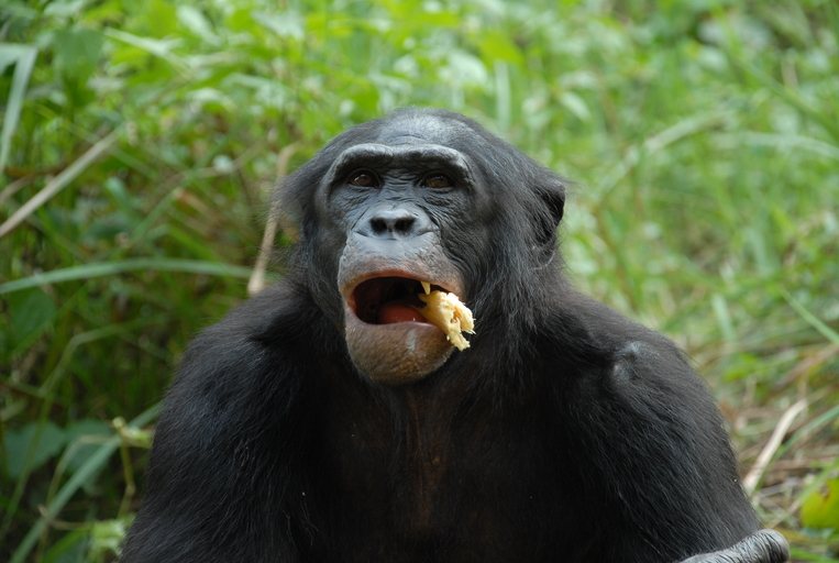 Pan paniscus